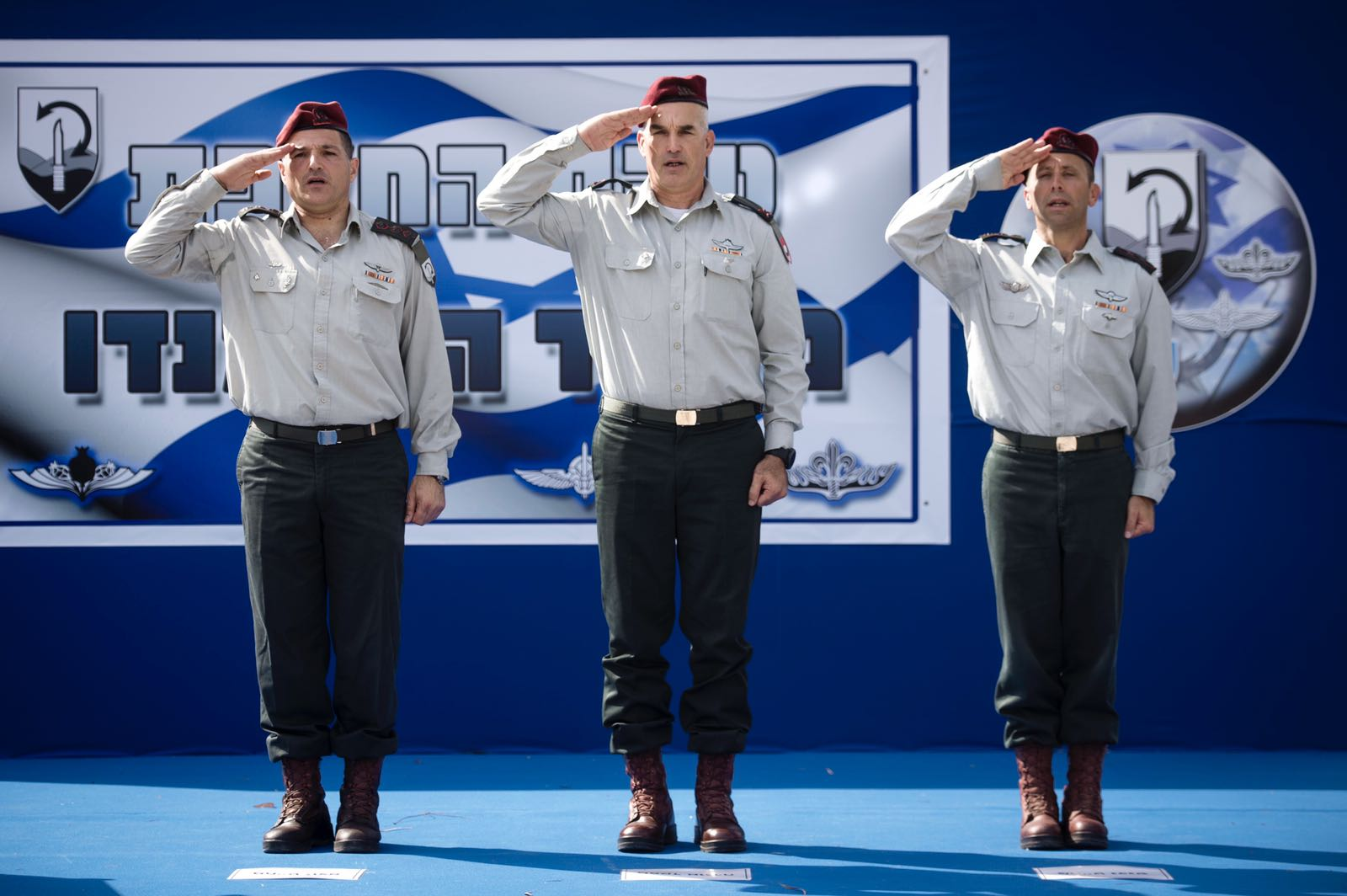 טקס חילופי מפקד לחטיבת "עוז". אל"ם אבי בלוט מחליף את אל"ם דוד זיני שכיהן בתפקיד זה במהלך השנתיים שחלפו.